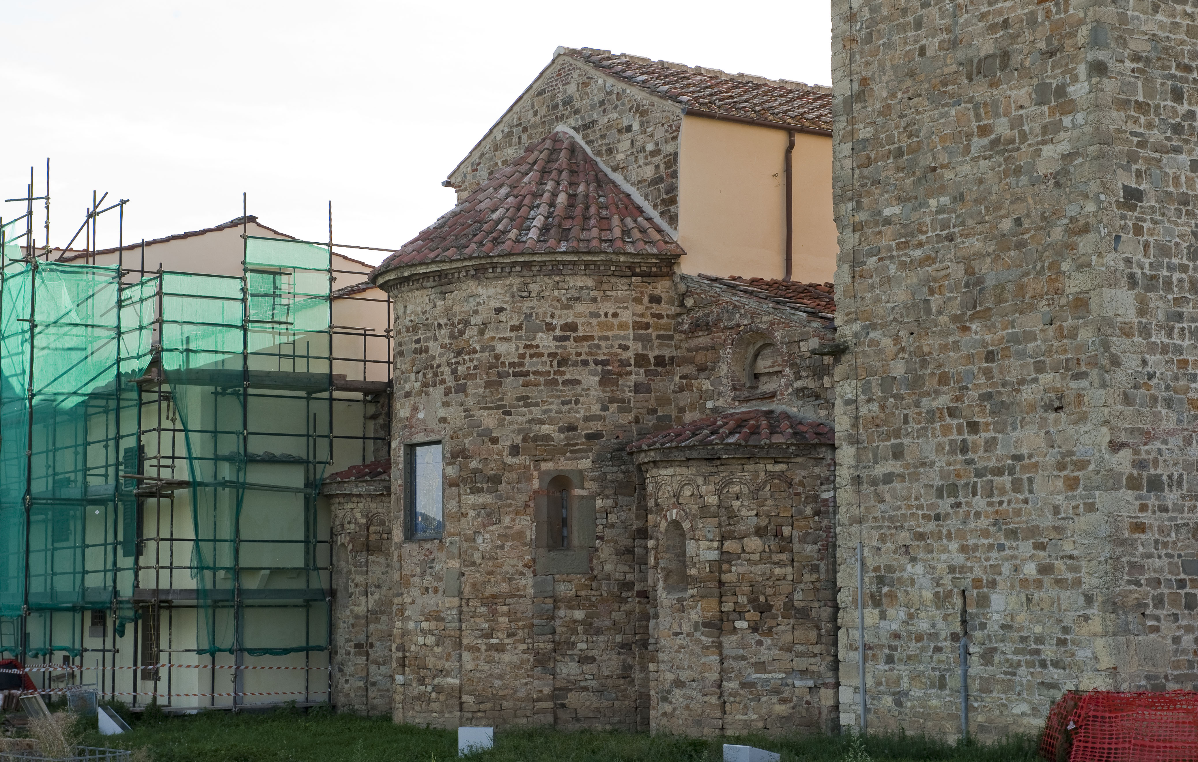 Abside della Pieve di San Giuliano a Settimo